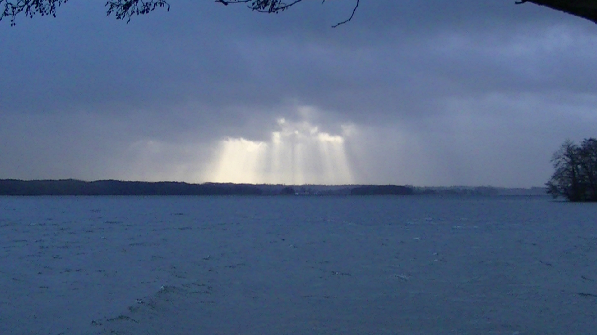 Sturmtief Andrea, Großer Plöner See